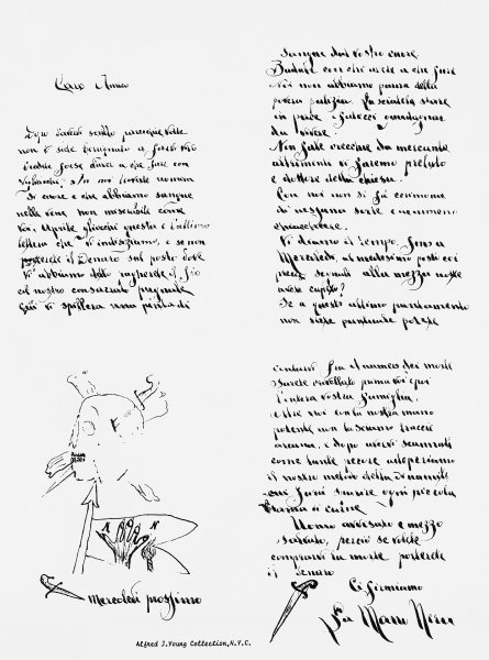 Ein Erpresserbrief der "Schwarzen Hand" einem amerikanischen Ableger der italienischen Mafia Anfang des 20. Jahrhunderts.